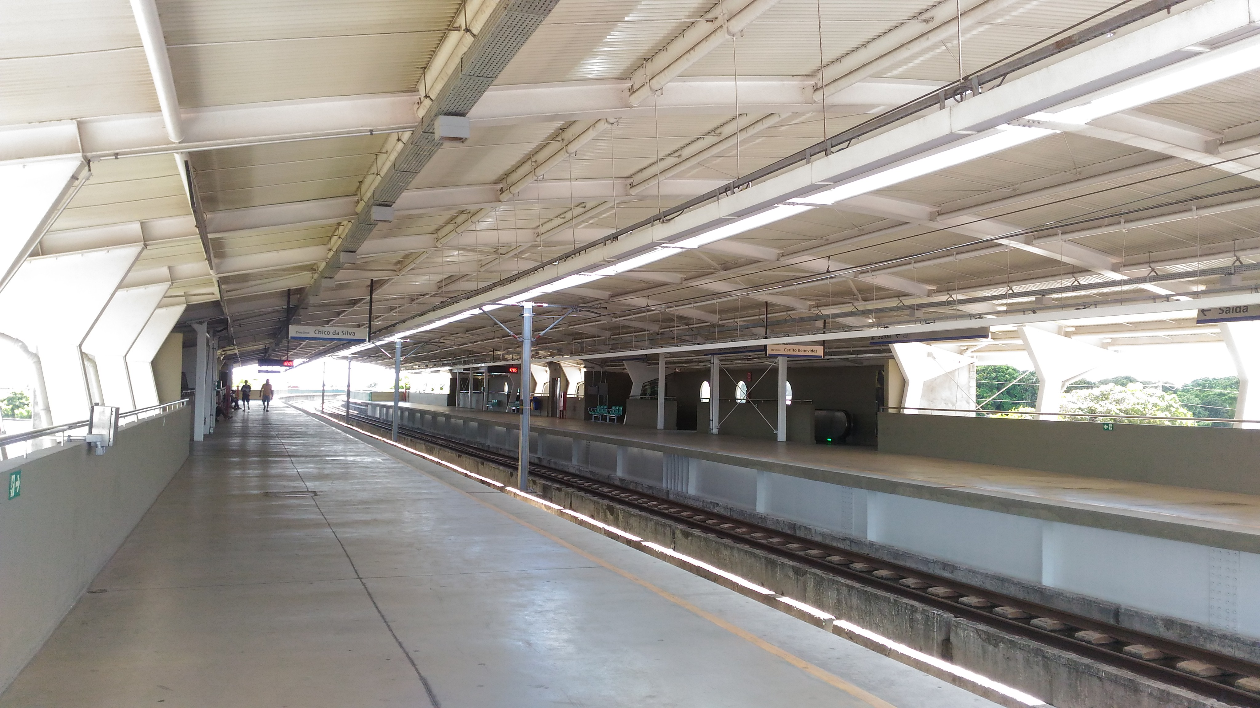 Plataformas da estação elevada Juscelino Kubitschek.